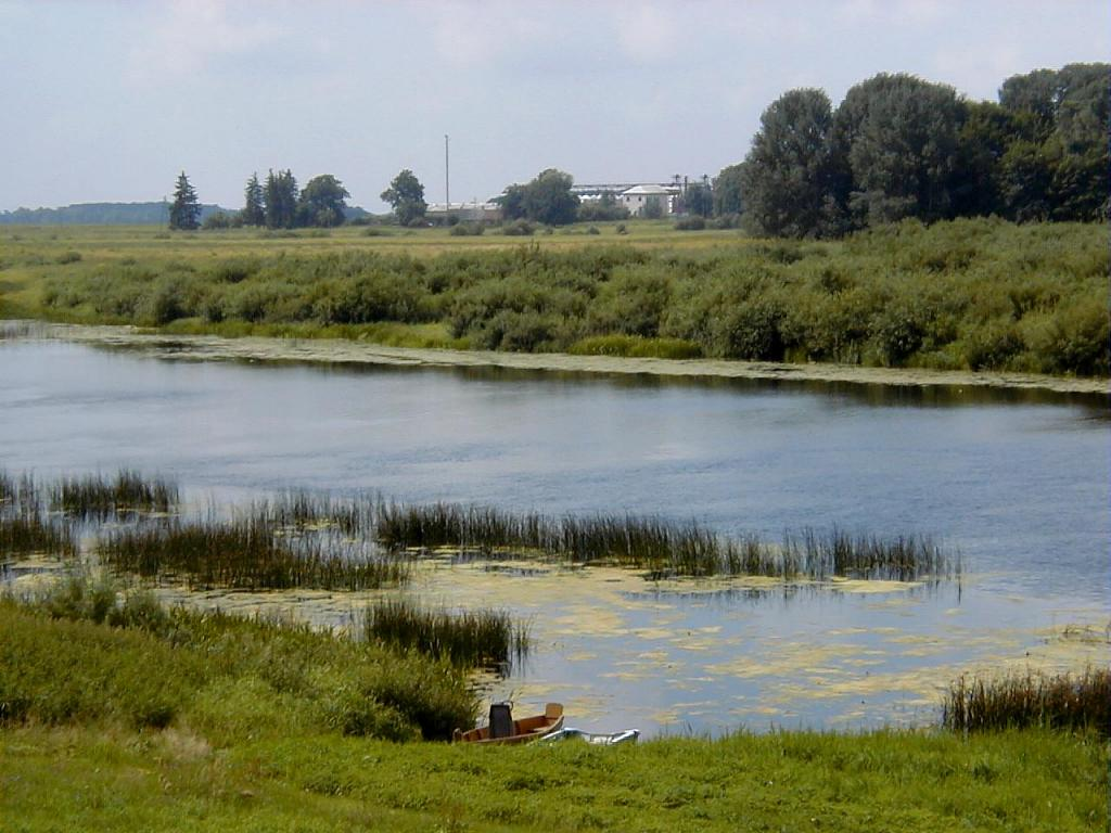 Lielupe pie Emburgas 2002-07-08